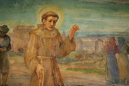 Mesocco: Chiesa San Rocco (Wandmalerei)